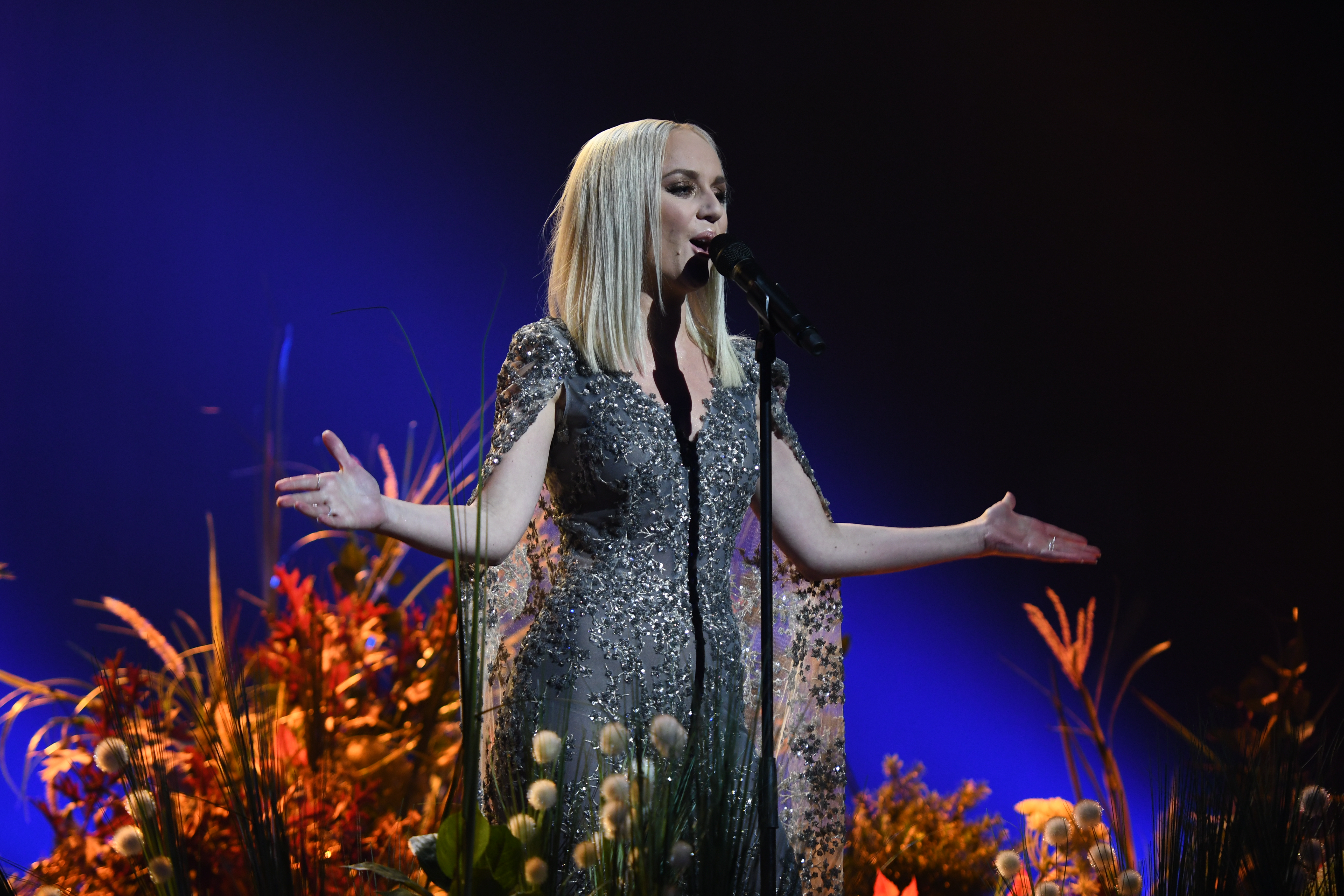 Melodifestivalen 2019, deltävling 1, Scandinavium, Göteborg, Anna Bergendahl